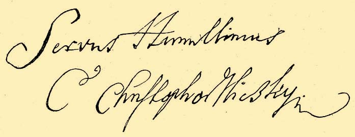 Niczky Kristóf aláírása (Servus humillimus C(omes). Christophor(us). Niczky mp)